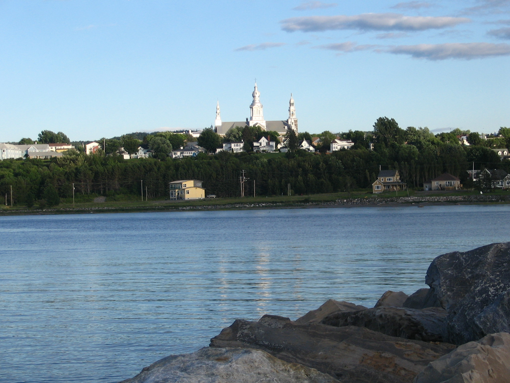 Vue de Trois-Pistoles dès le quai.